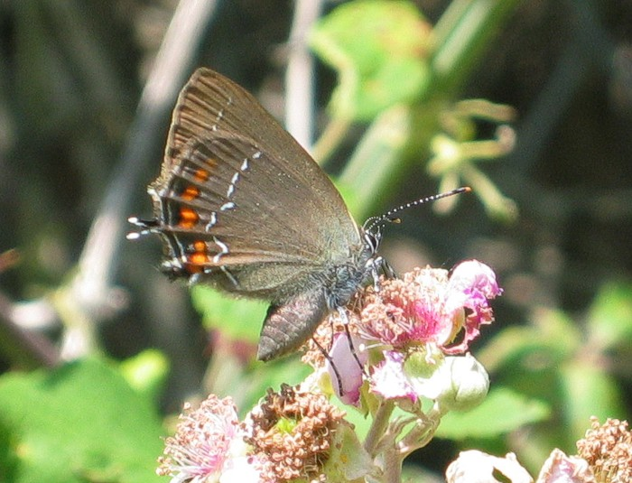 Umbria, Spoleto, Valnerina, near Borgo Cerreto, 2005.06.25 more info (in german)